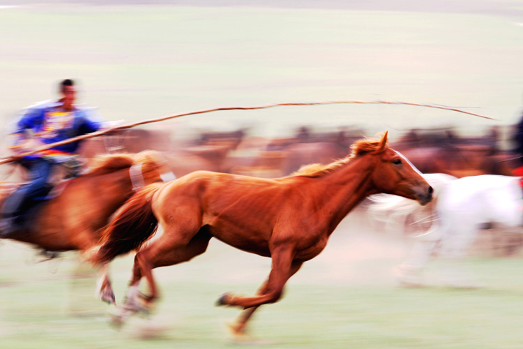 蒙古族在牧马